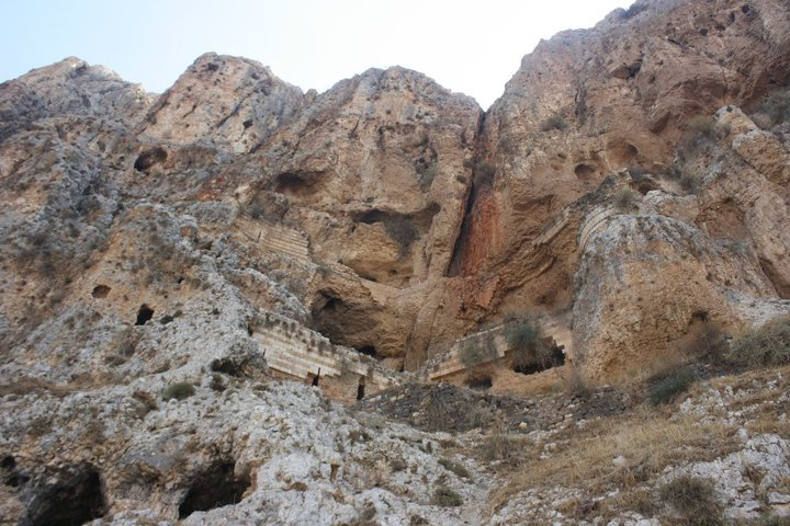 Arbel fortress